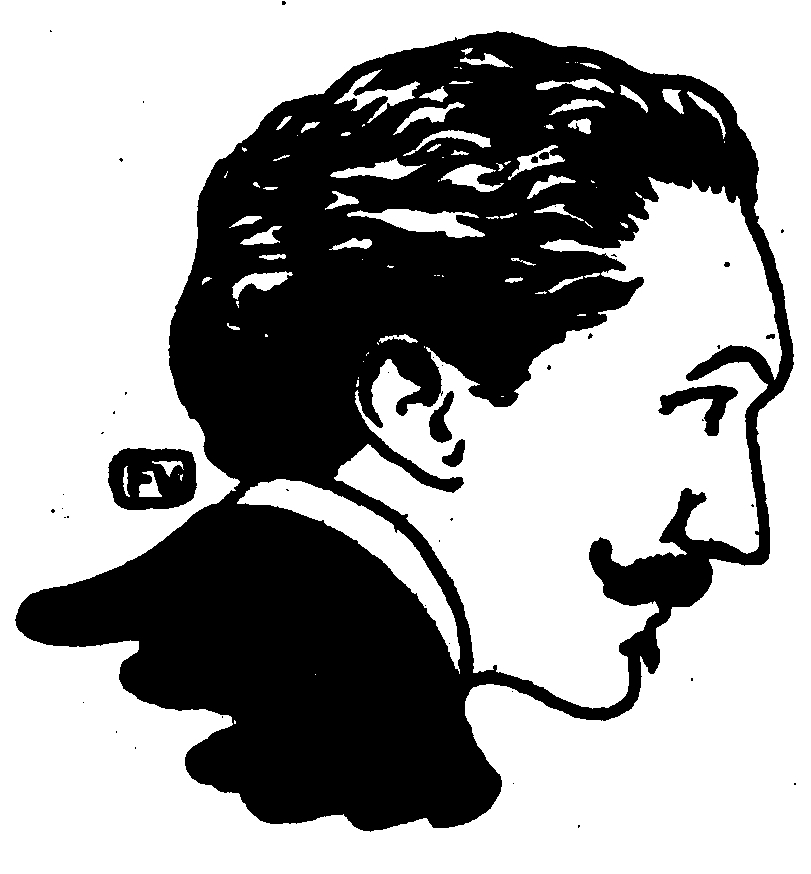 Portrait of French poet and dandy Robert de Montesquiou (1855-1921) from Le Livre des masques (vol. II, 1898) by Remy de Gourmont (1858-1916)